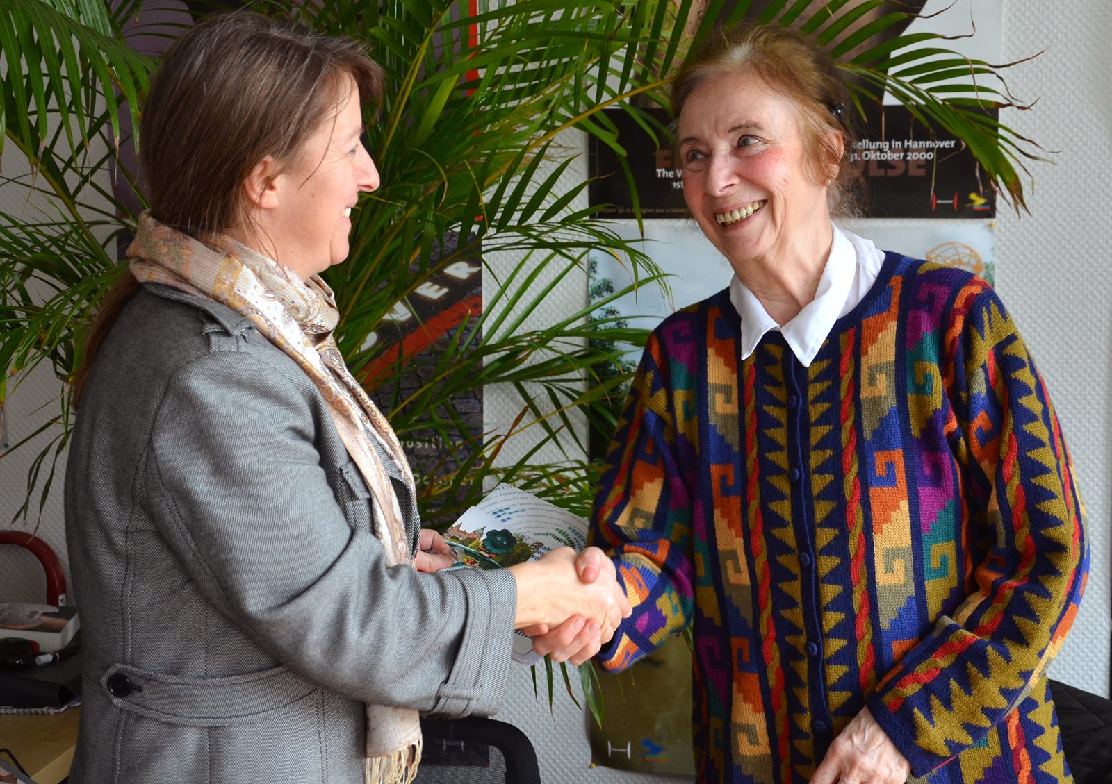 Gil Maria Koebberling (links), Geschäftsführerin vom Freundeskreis Hannover, und die Künstlerin Heralde Schmitt-Ulms, 1. Vorsitzende GEDOK NiedersachsenHannover ...